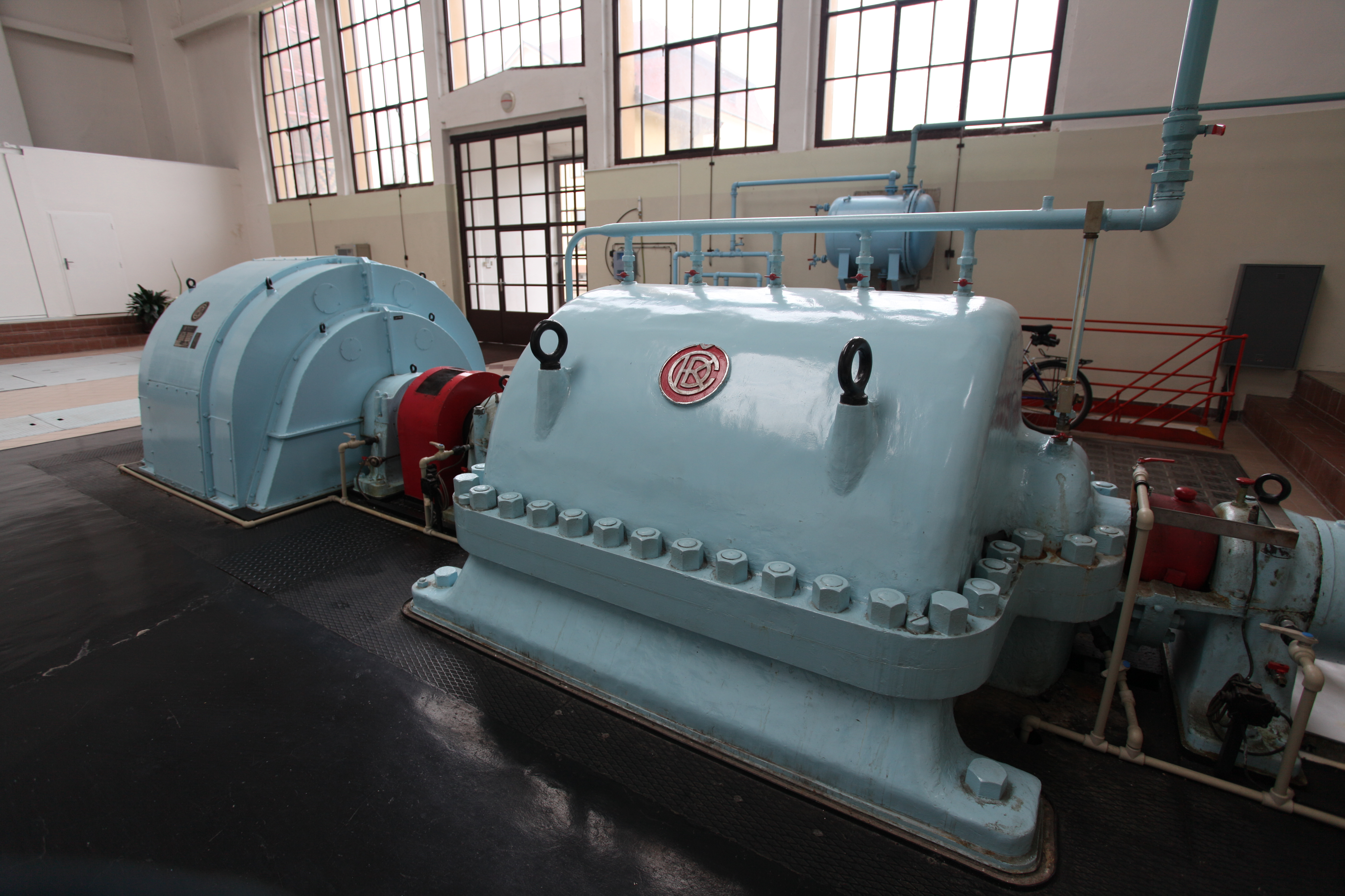 Elektrická odstředivá čerpadla se používala k výtlaku vody do vodovodních řadů I, II a III. od roku 1936. V současnosti jsou nahrazována elektrickými čerpadly o nižší spotřebě. Výkon 1000l/s, příkon 2 MW. Zdroje: Křivánek, Oldřich a Kněžek, Miroslav. 2001. Zdroje pitné vody v Káraném. Principy získávání vody v oblasti káranské vodárny. Pražské vodovody a kanalizace a.s.